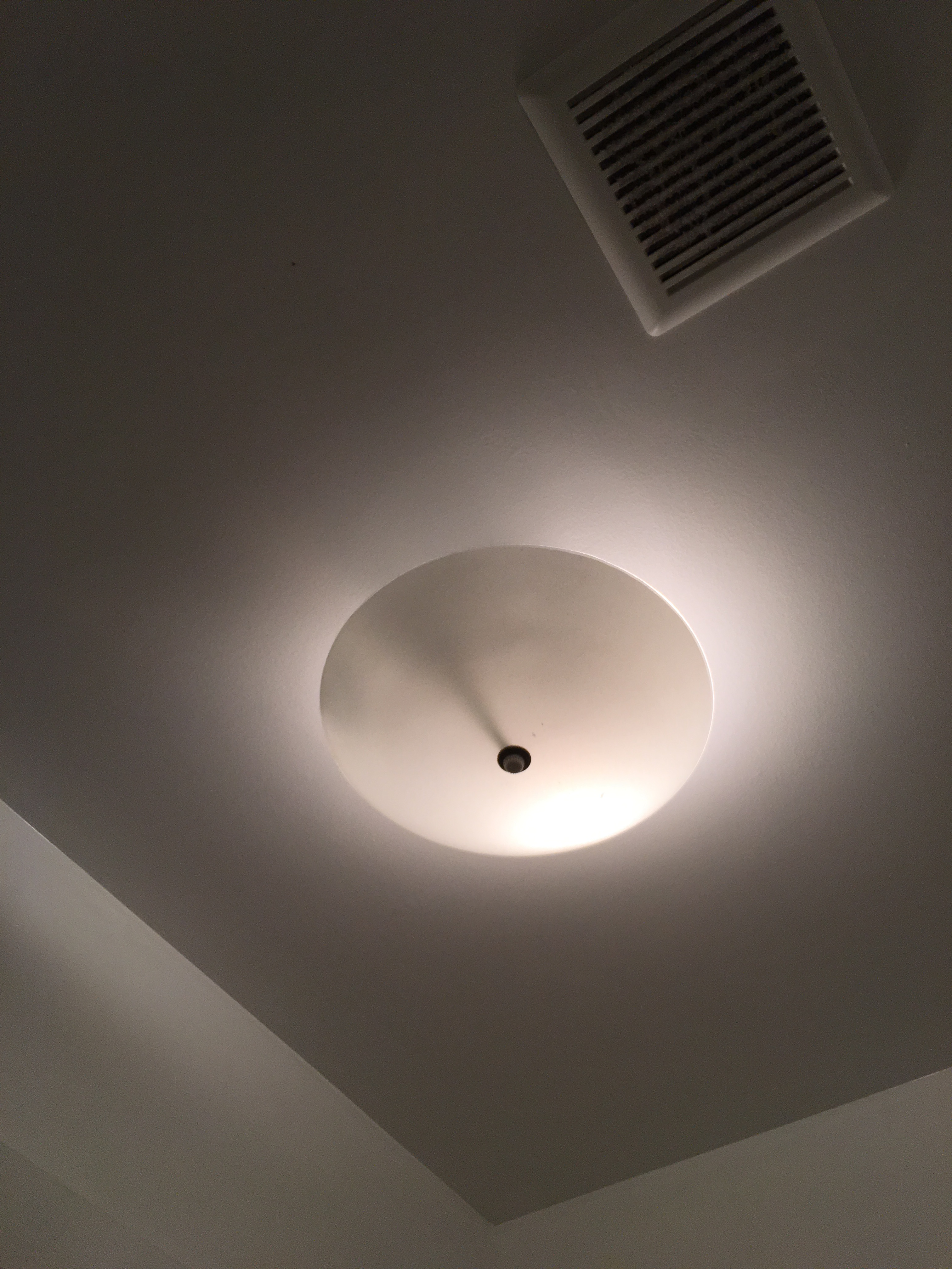 Ceiling Lamp